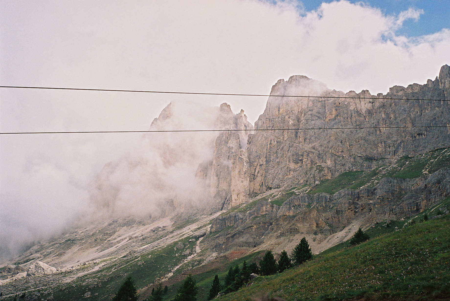 De Catinaccio/Rosengarten (Zuid-Tirol, Italië) vanop zijn eigen flank. Eigen werk, vrij voor het publiek.